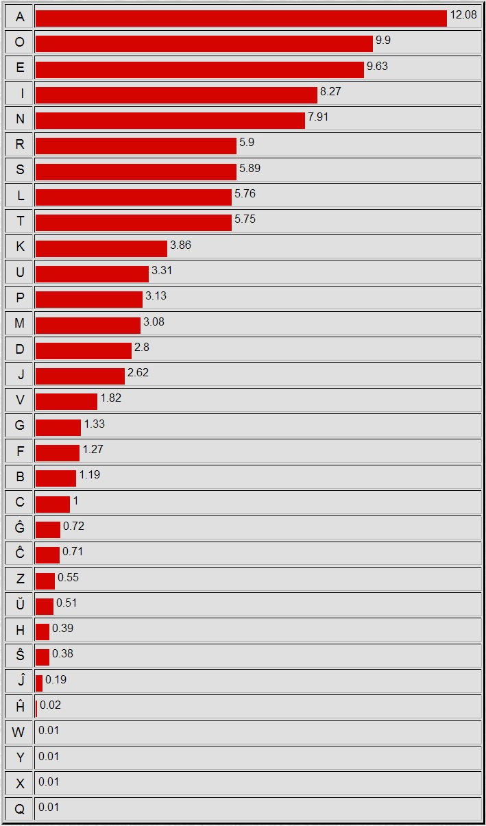 Ofteco de Esperantaj literoj